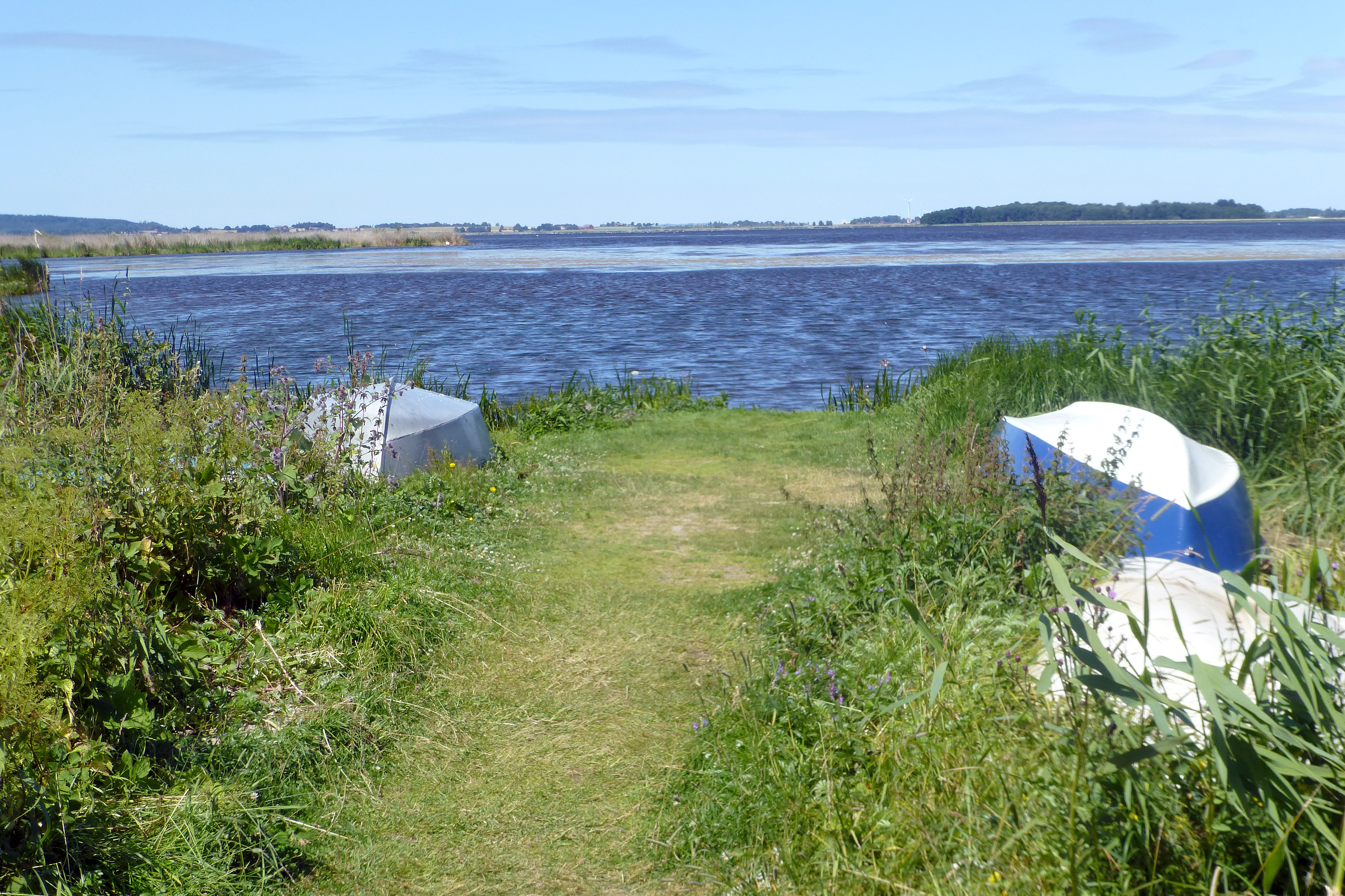 Tåkern set mod nordvest